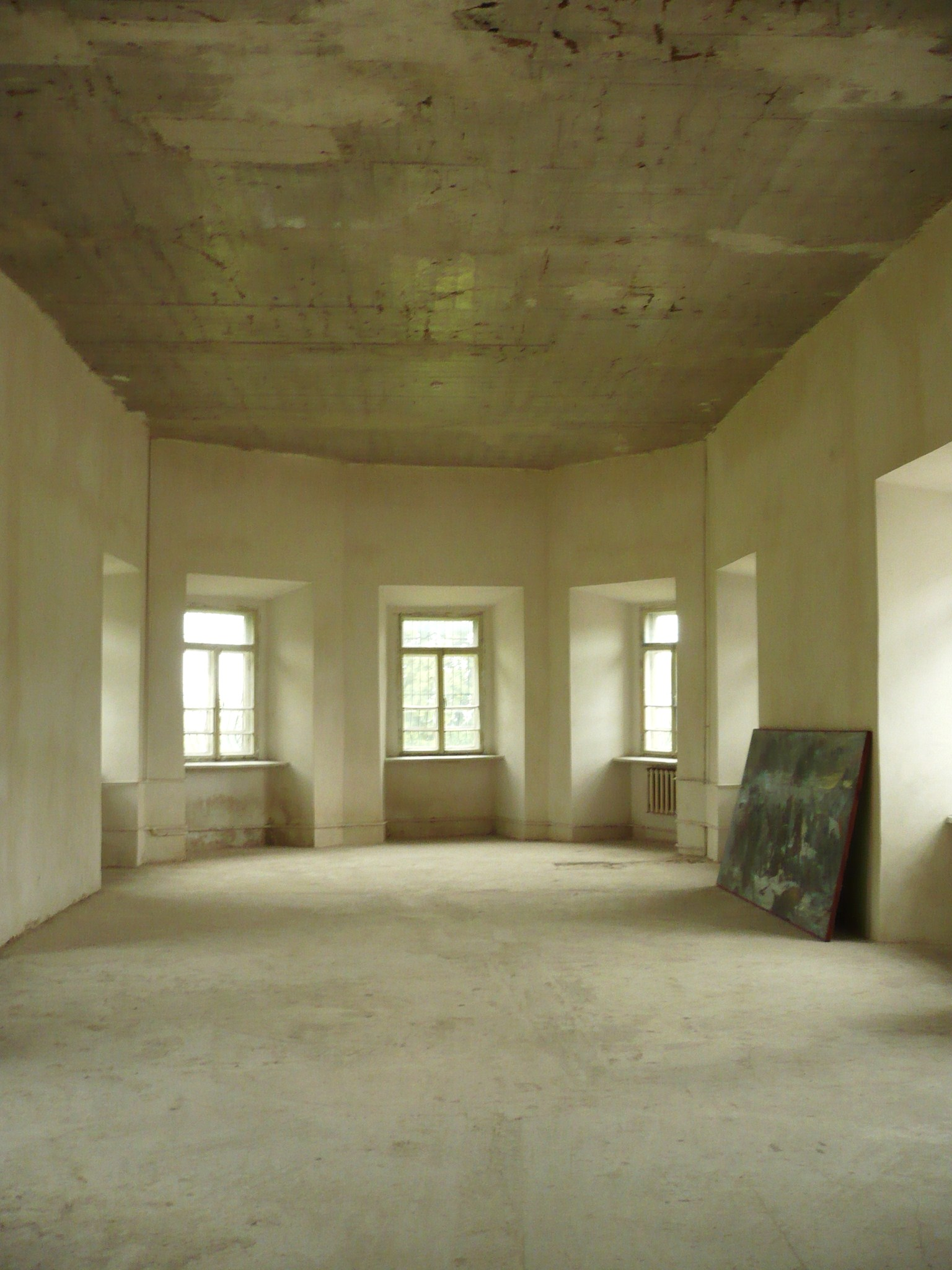 Zbaraż, sala zamku